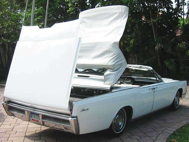 1966 Continental Convertible / Ort: USA/Florida/Miami Beach